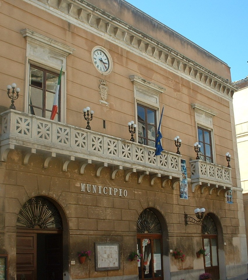 Petralia Sottana (PA), Palazzo del Giglio (Municipio).